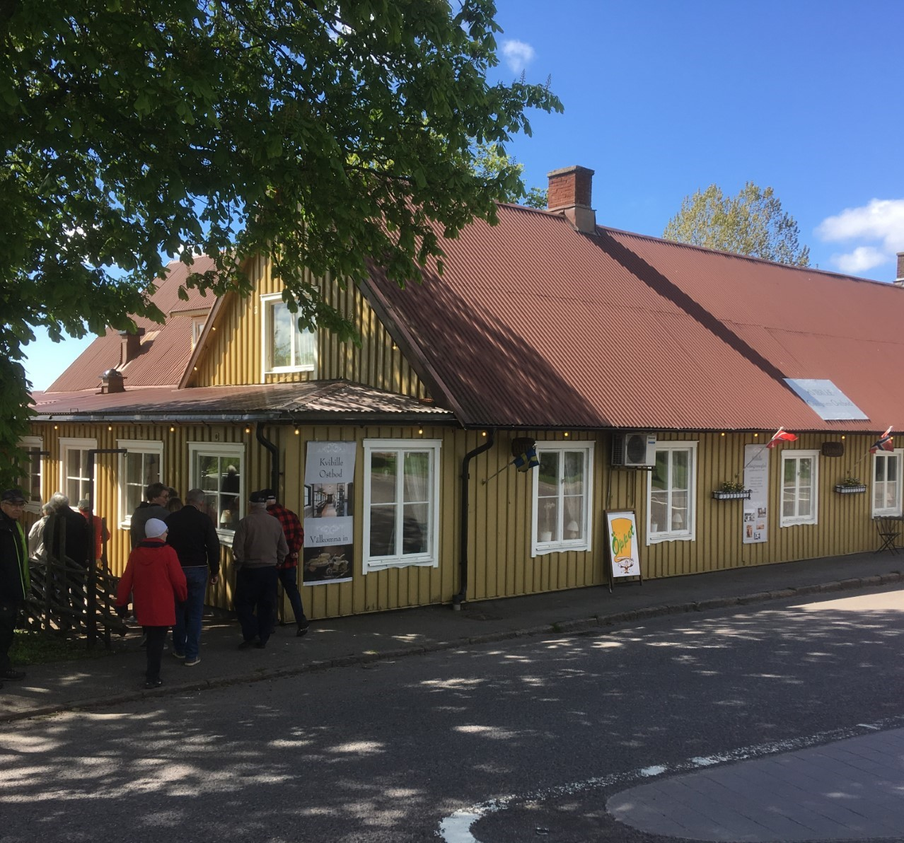 Kvibille Gästis med månghundraåriga anor.